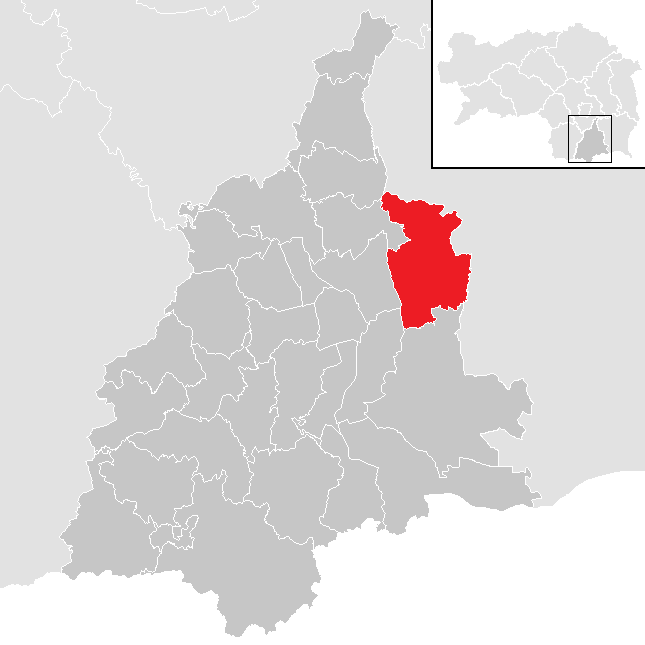 Lage von Schwarzautal im Bezirk Leibnitz